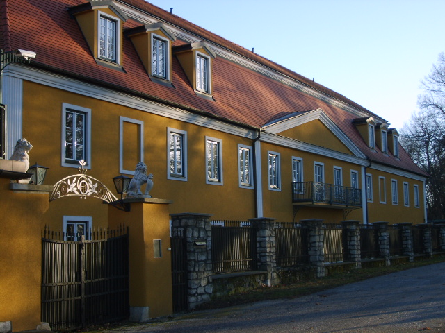 Das "Kollerhaus" in Oberwaltersdorf